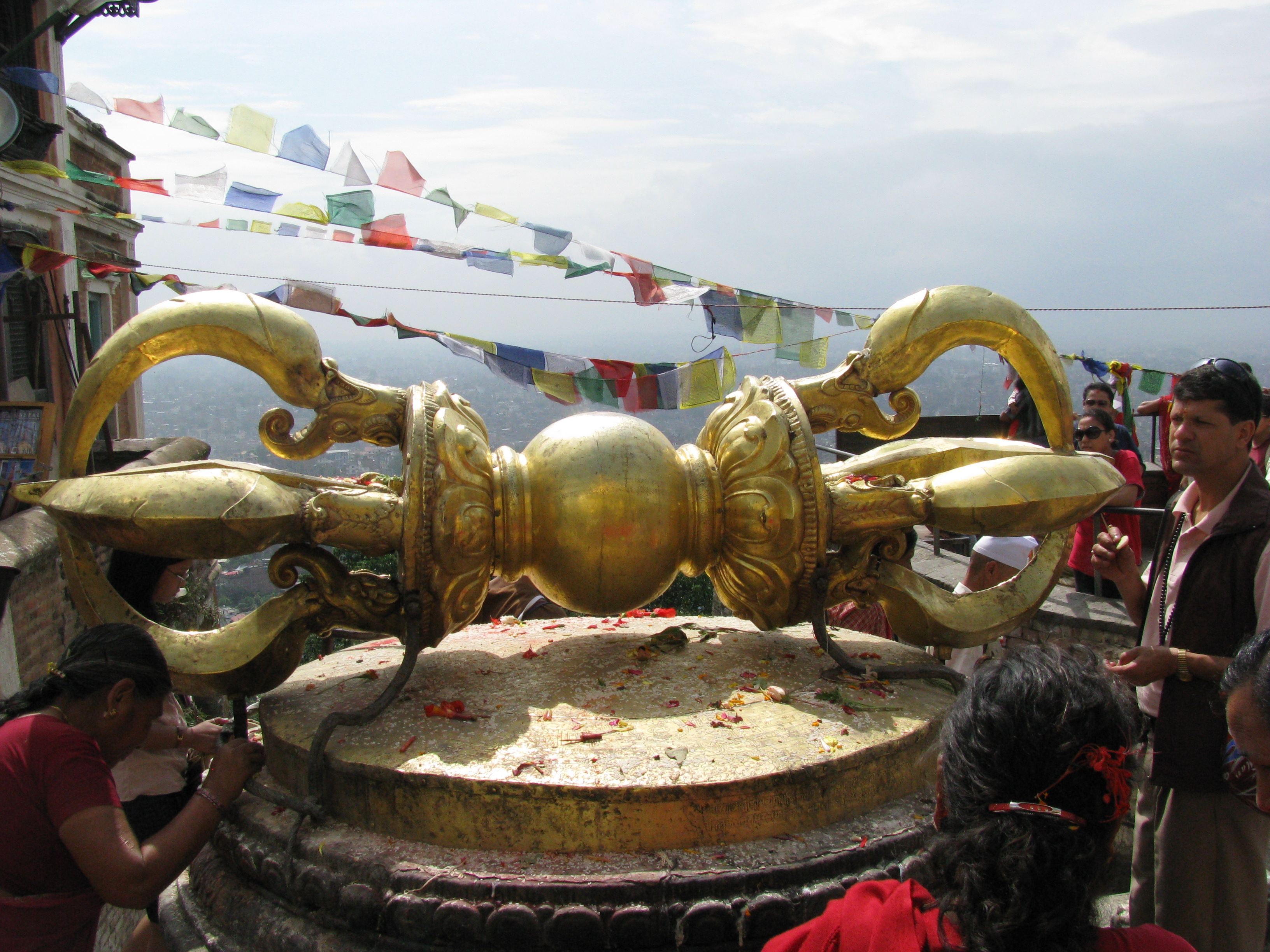 Soyambhu Kathmandu Nepal